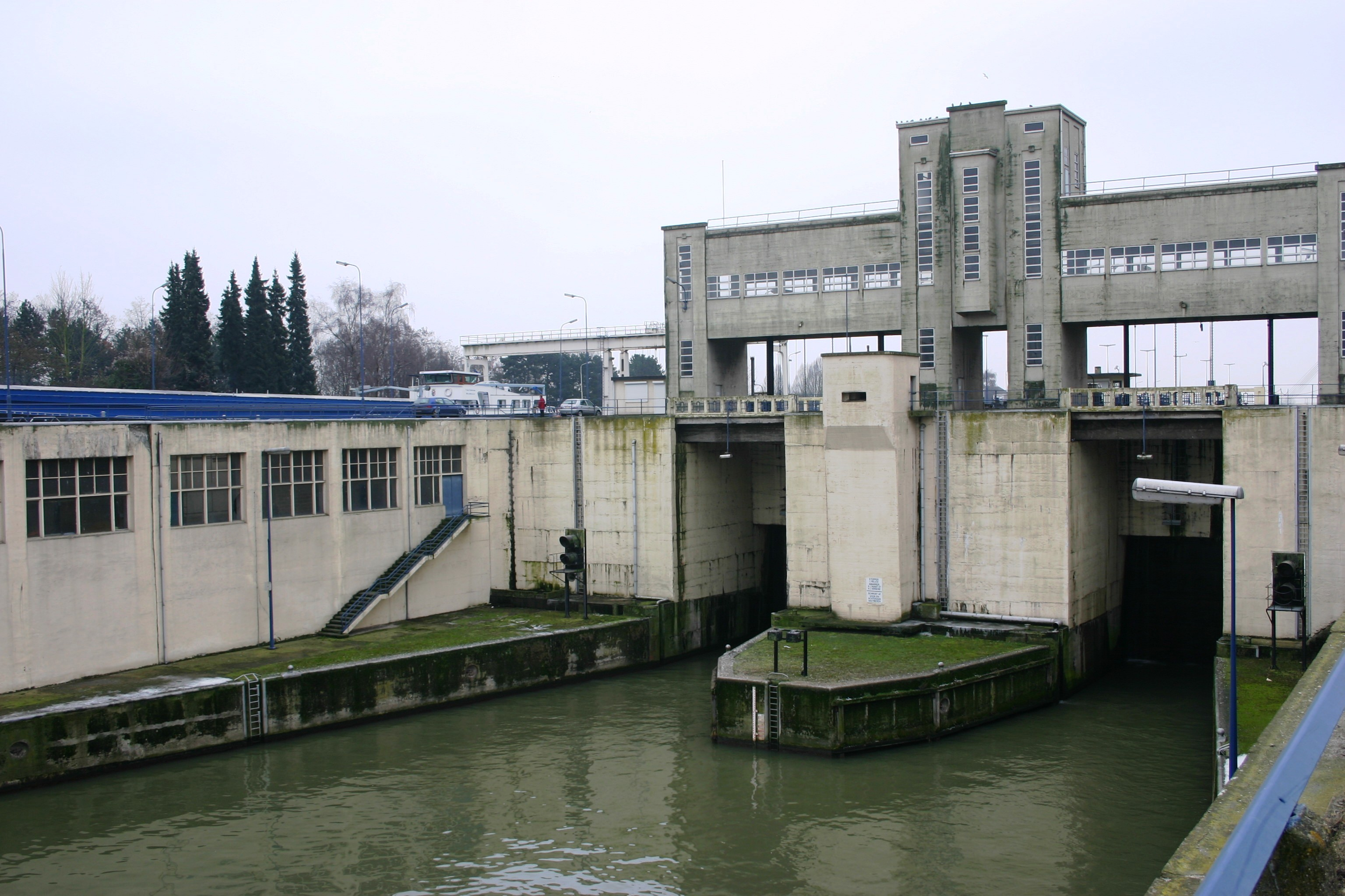 Schleis vu Lanaye, Paarten vun de klengen Schleisen.